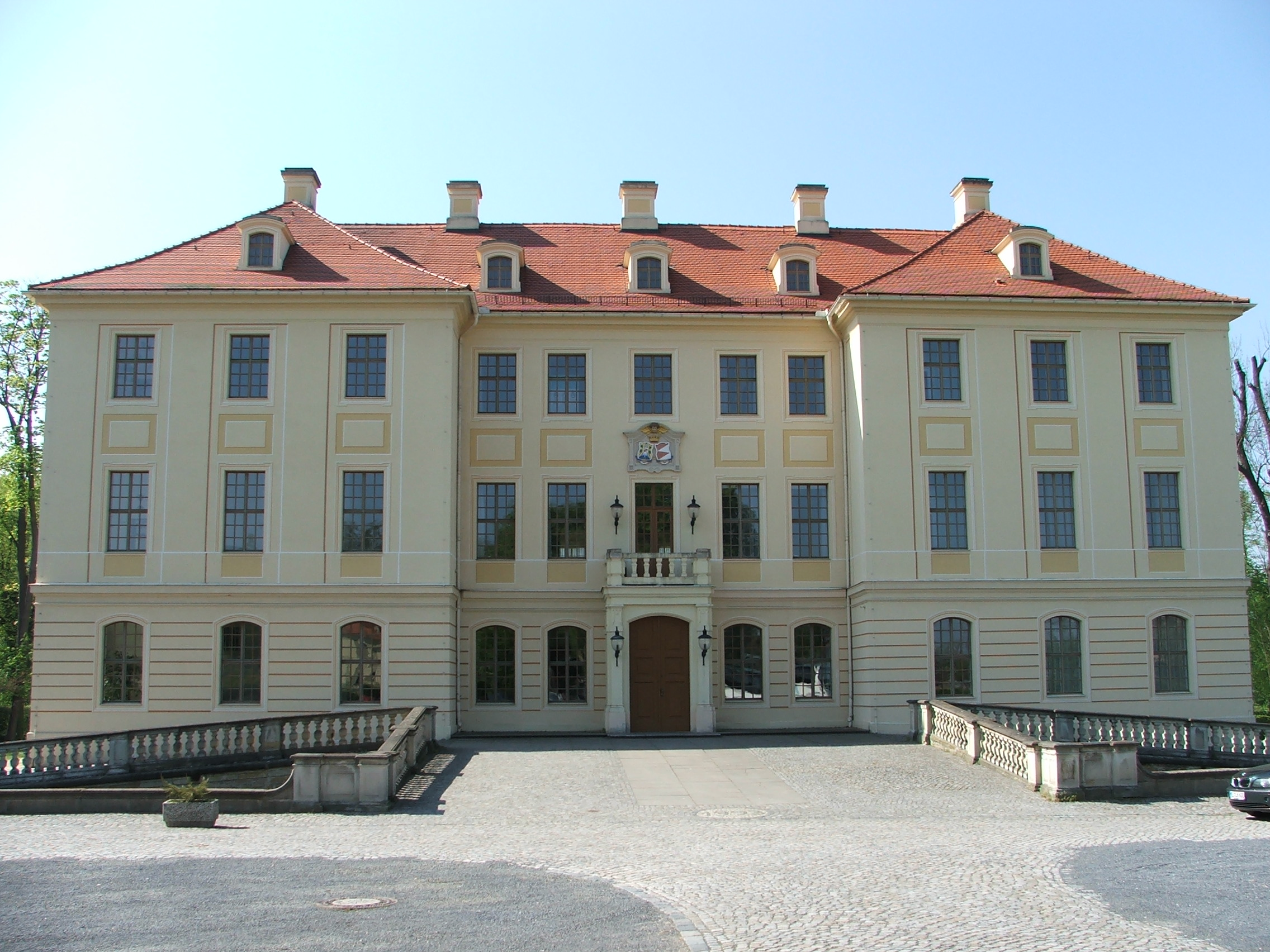 Palais (neues Schloss) in Zabeltitz